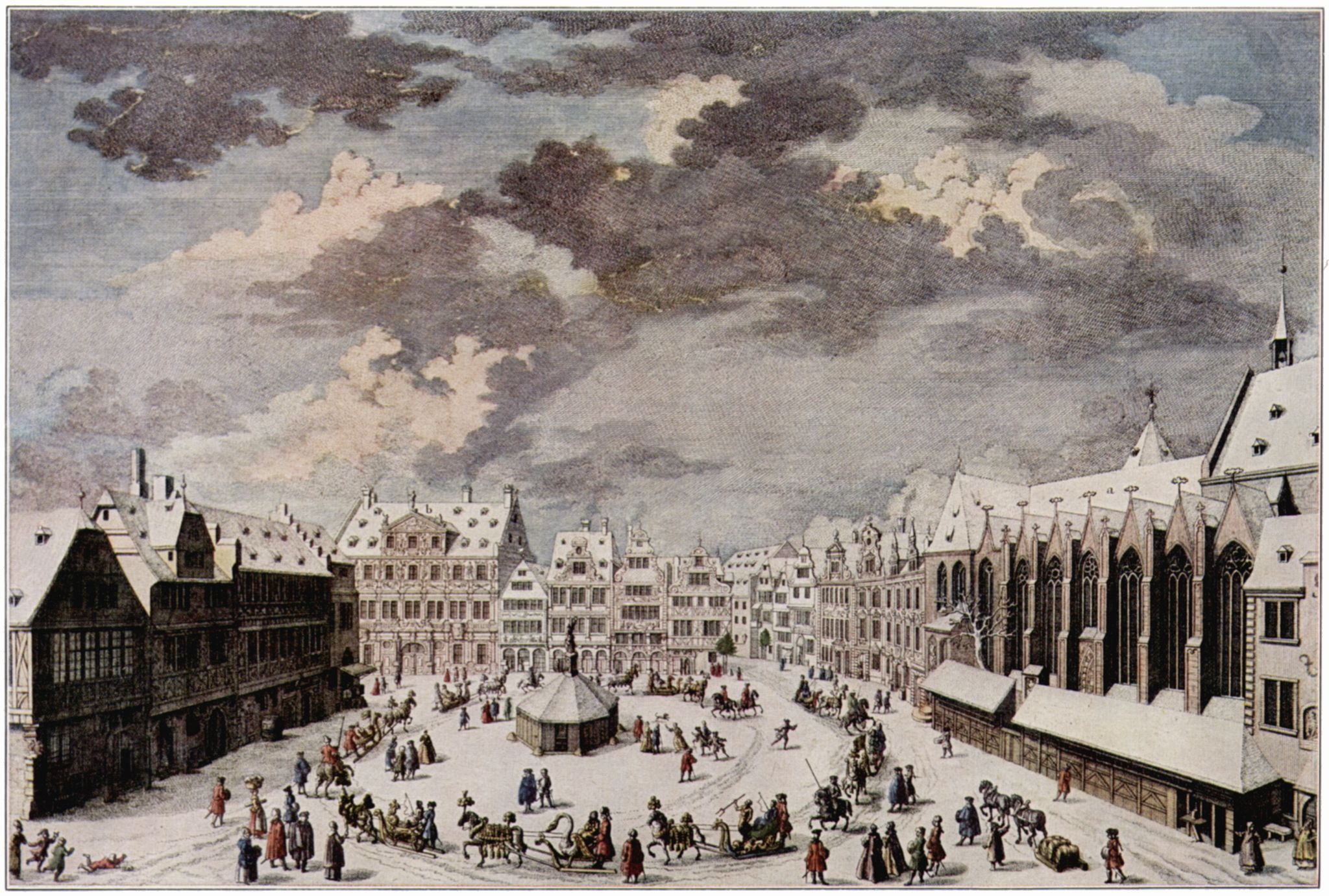 Kolorierter Kupferstich 21 x 32 cm; Ansicht des Liebfrauenberges von Osten im Winter 1738.